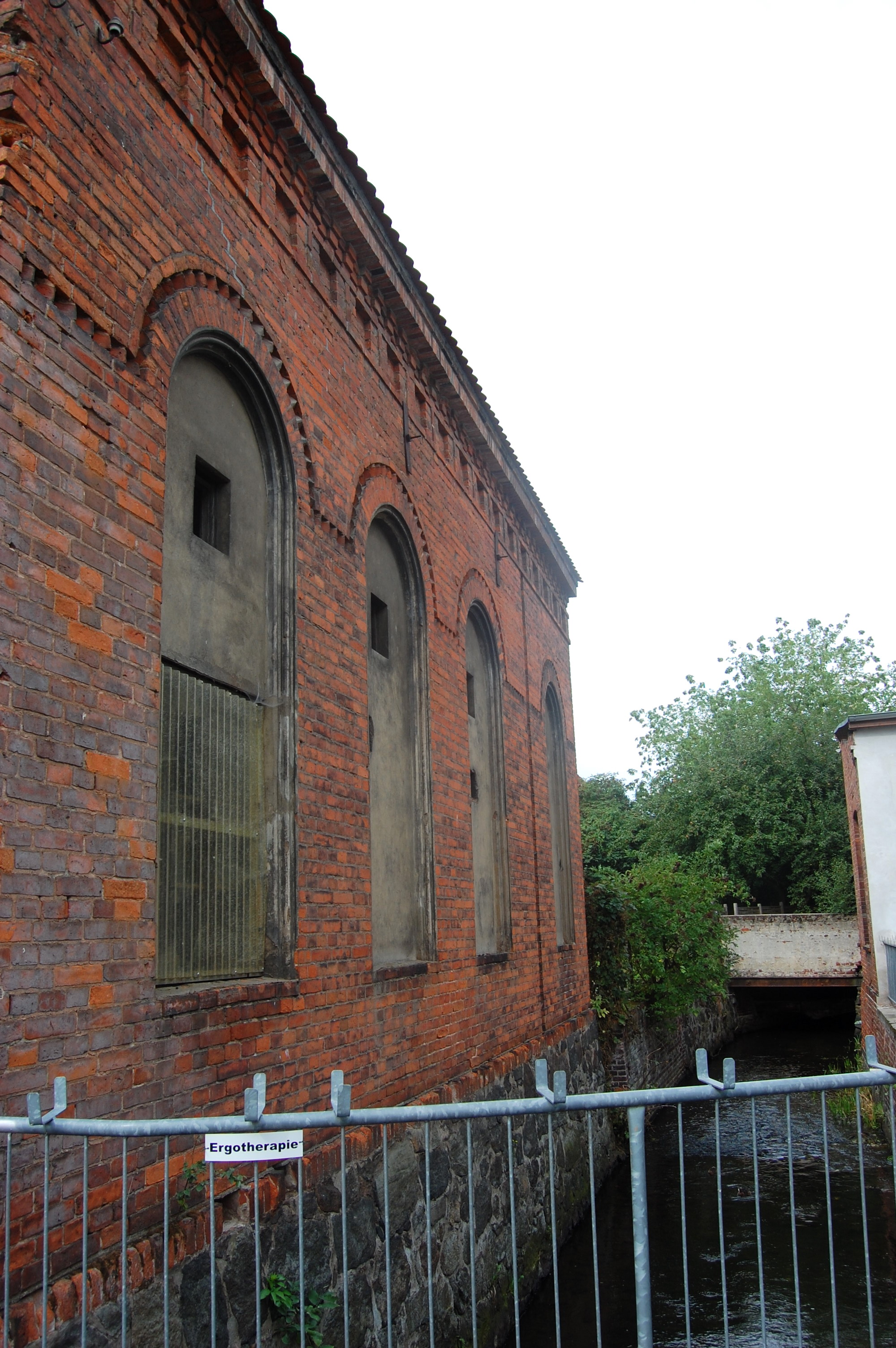 Synagoge in Burg (bei Magdeburg), Flussseite